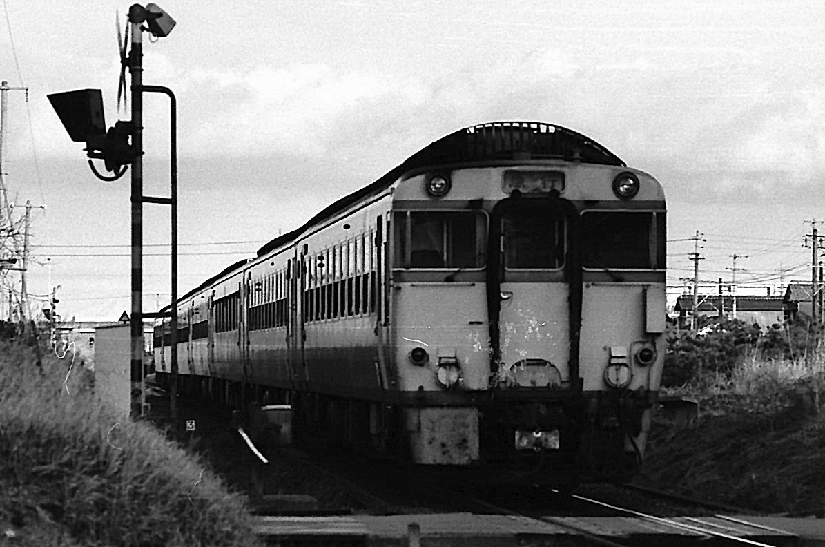 キハ９０＠那加駅構内踏切